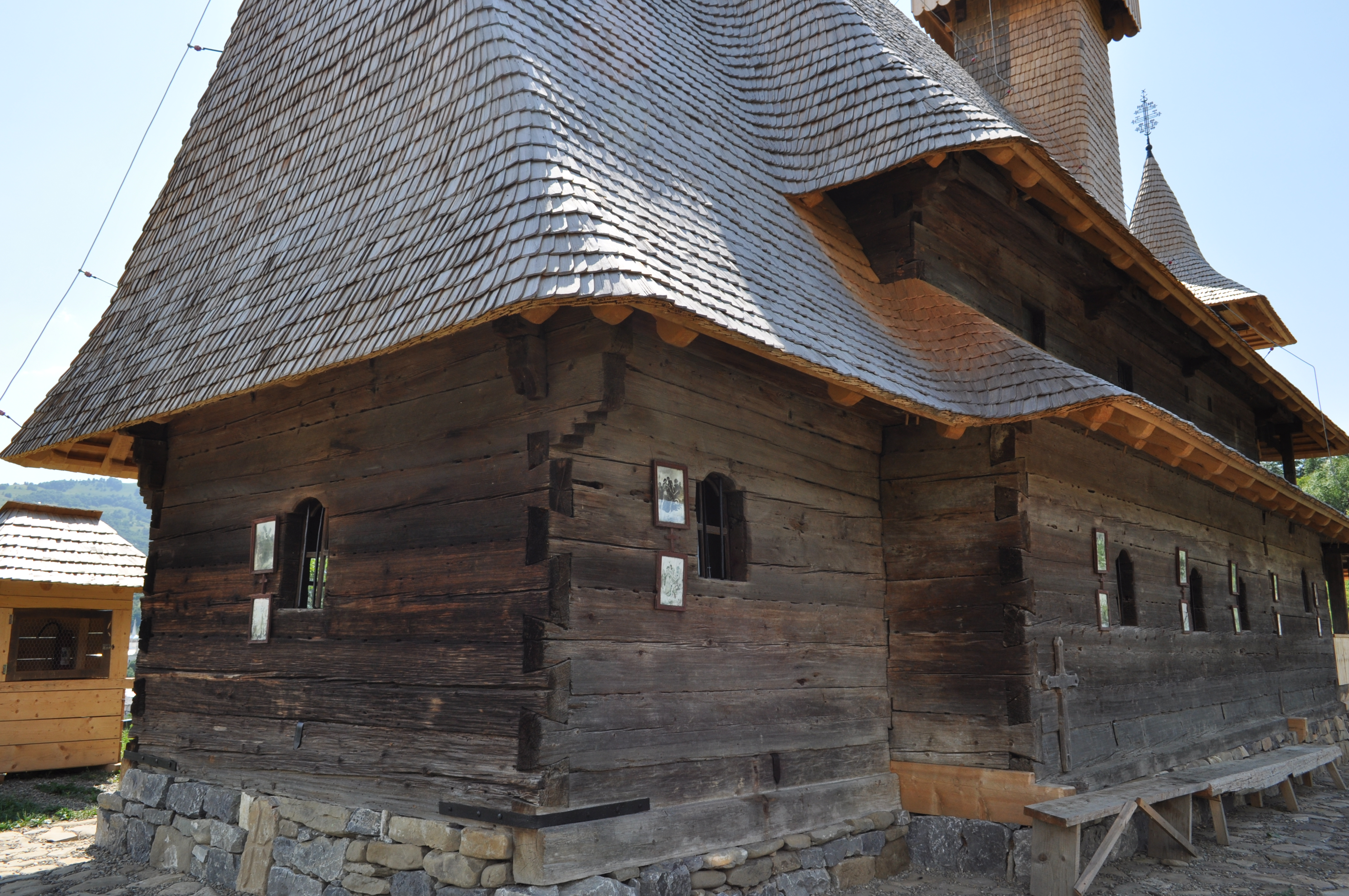 Biserica de lemn "Sfântul Nicolae" (a Nistoreştilor) , oraş SĂLIŞTEA DE SUS